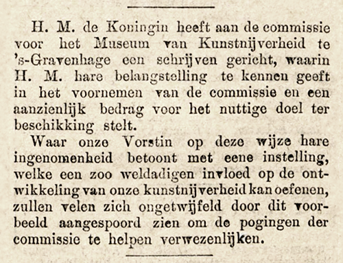 Museum van Kunstnijverheid, Den Haag, in Algemeen Handelsblad 1889-04-24